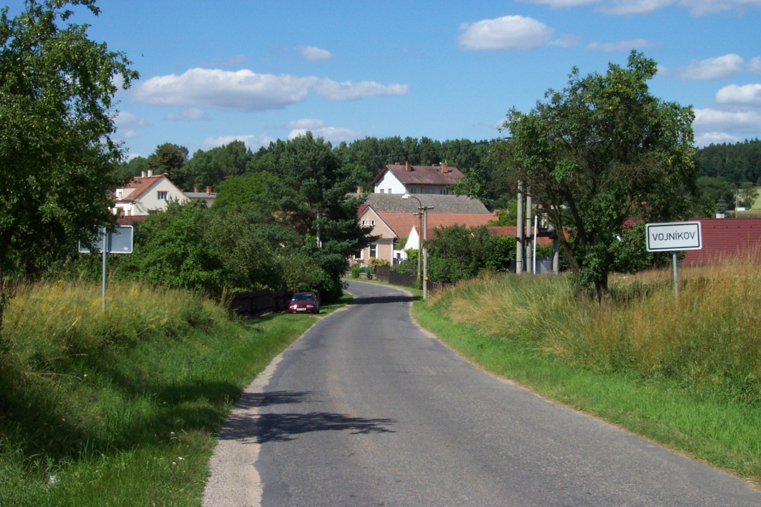 Obec Vojníkov